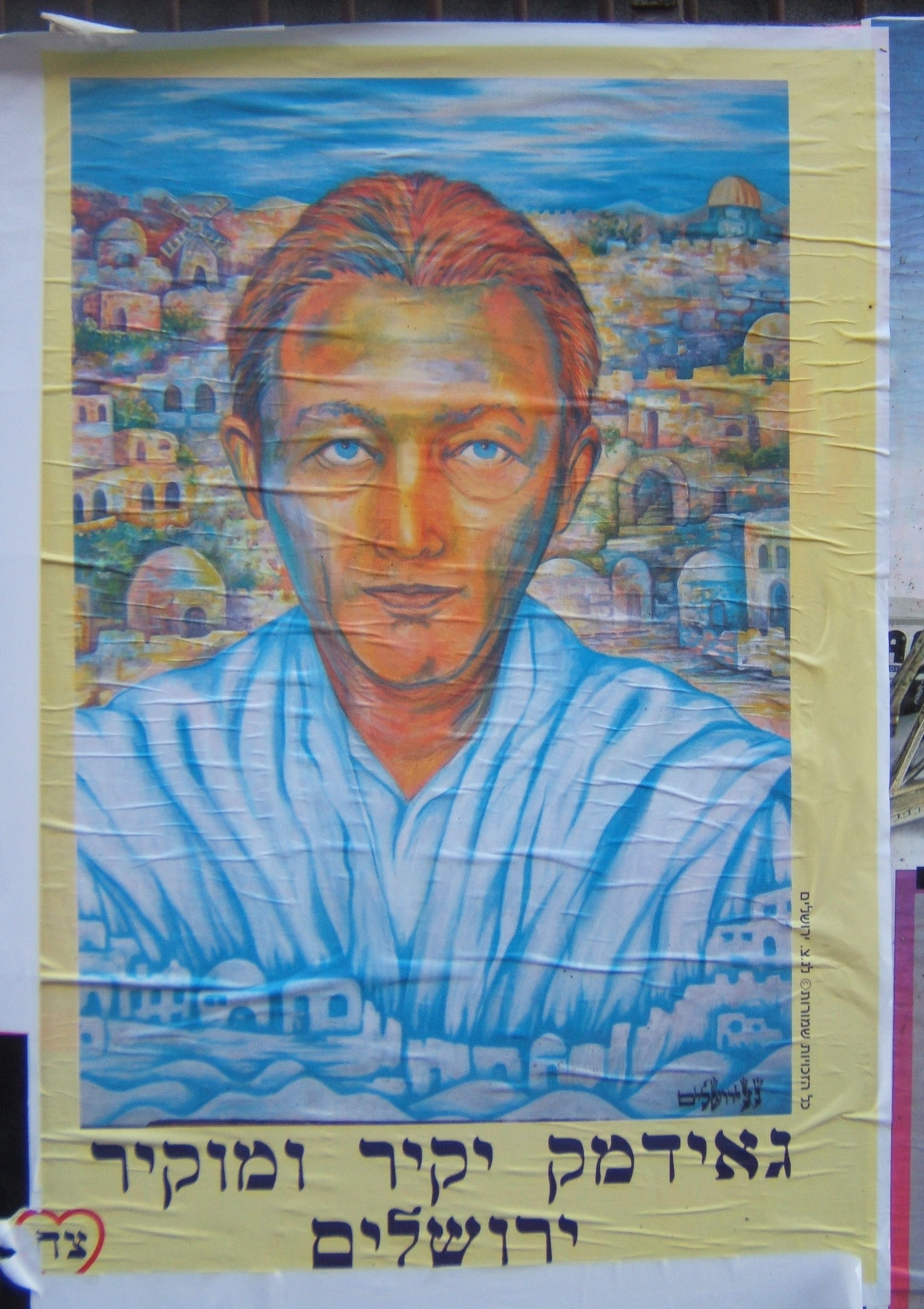 פוסטר של אריה בר-לב